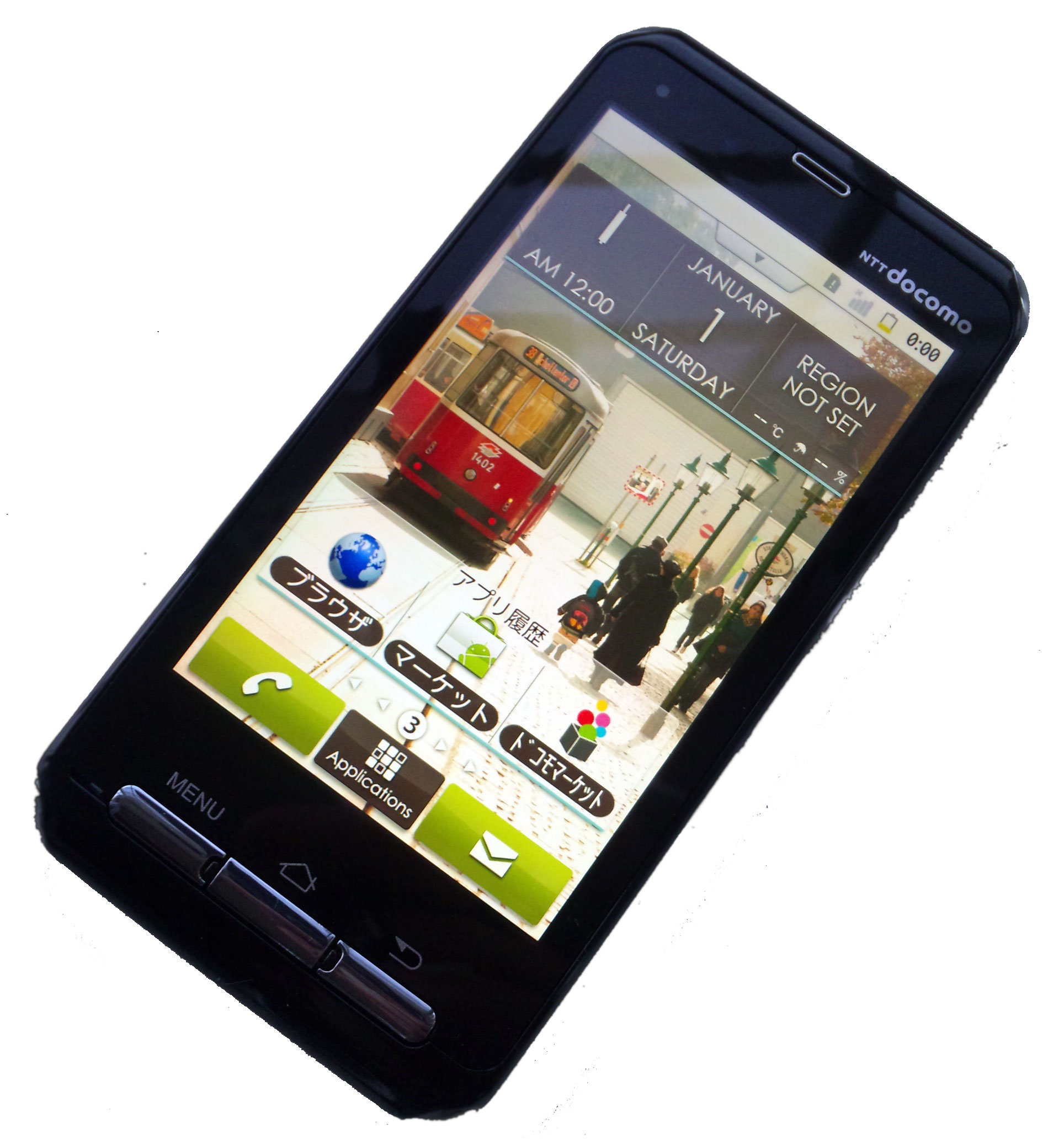 F-12C正面